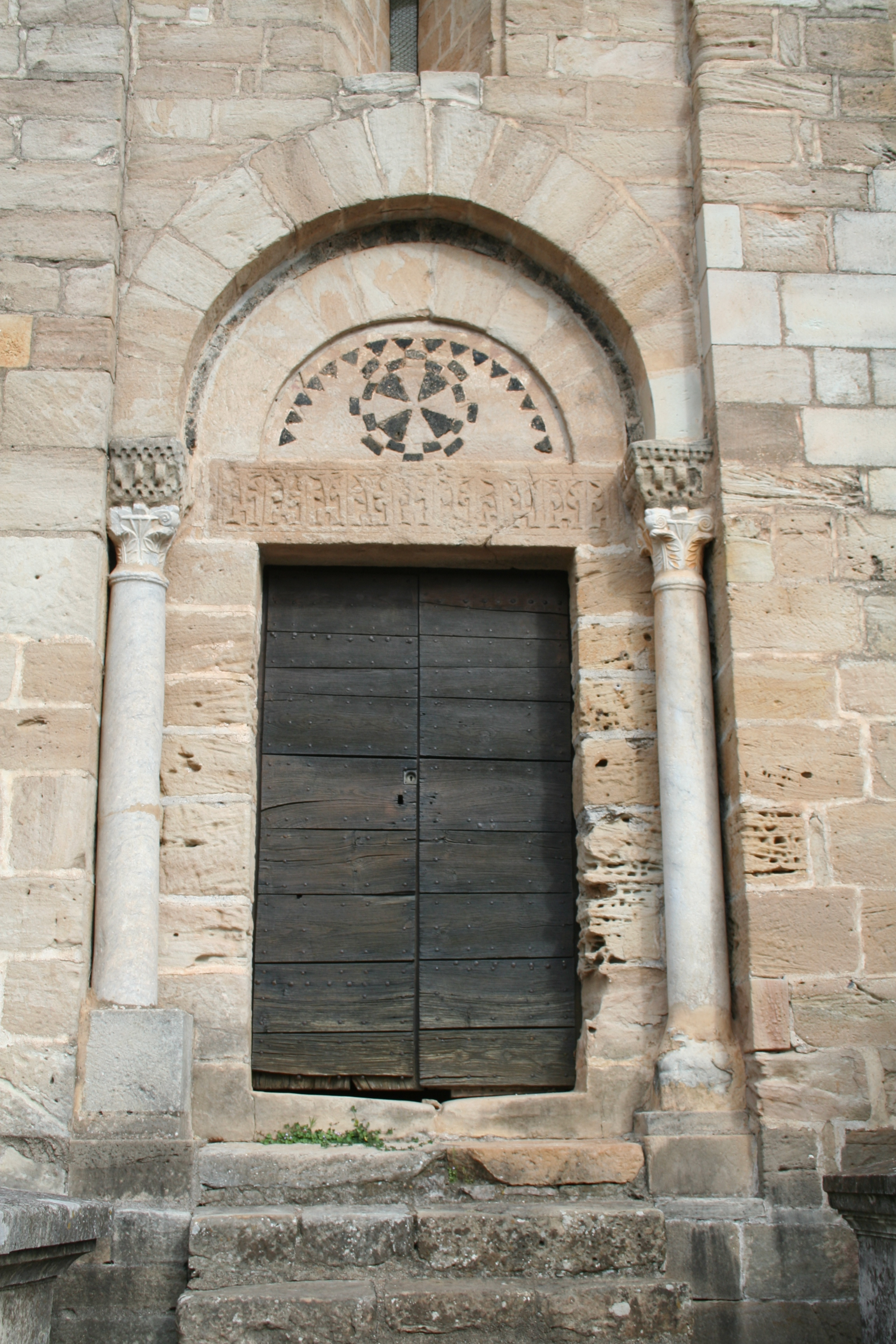 Saint-Pierre-de-Rhèdes (Lamalou-les-Bains - Hérault) - église romane - porte méridionale.